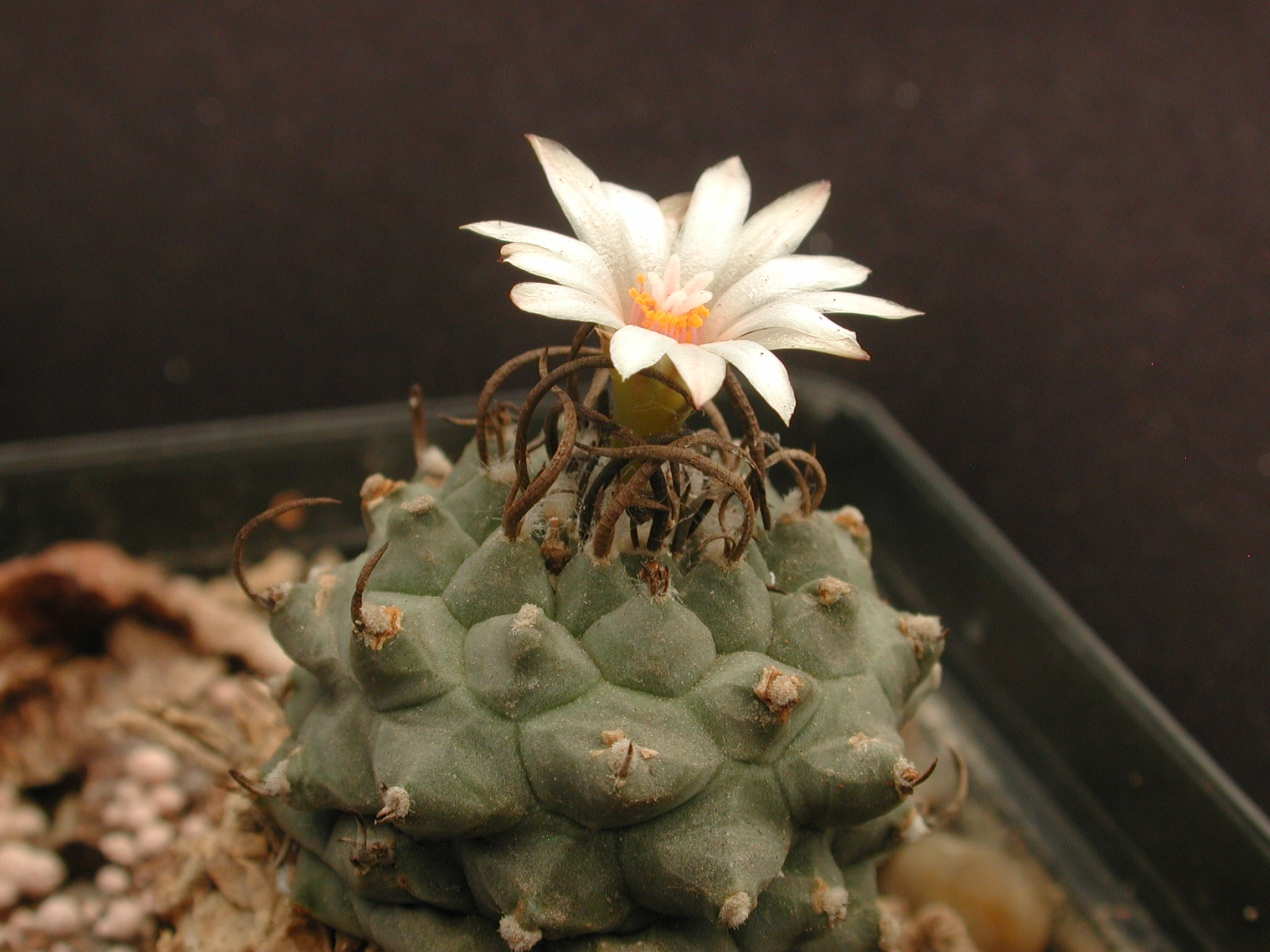 Turbinicarpus schwarzii Turbinicarpus schwarzii, own work